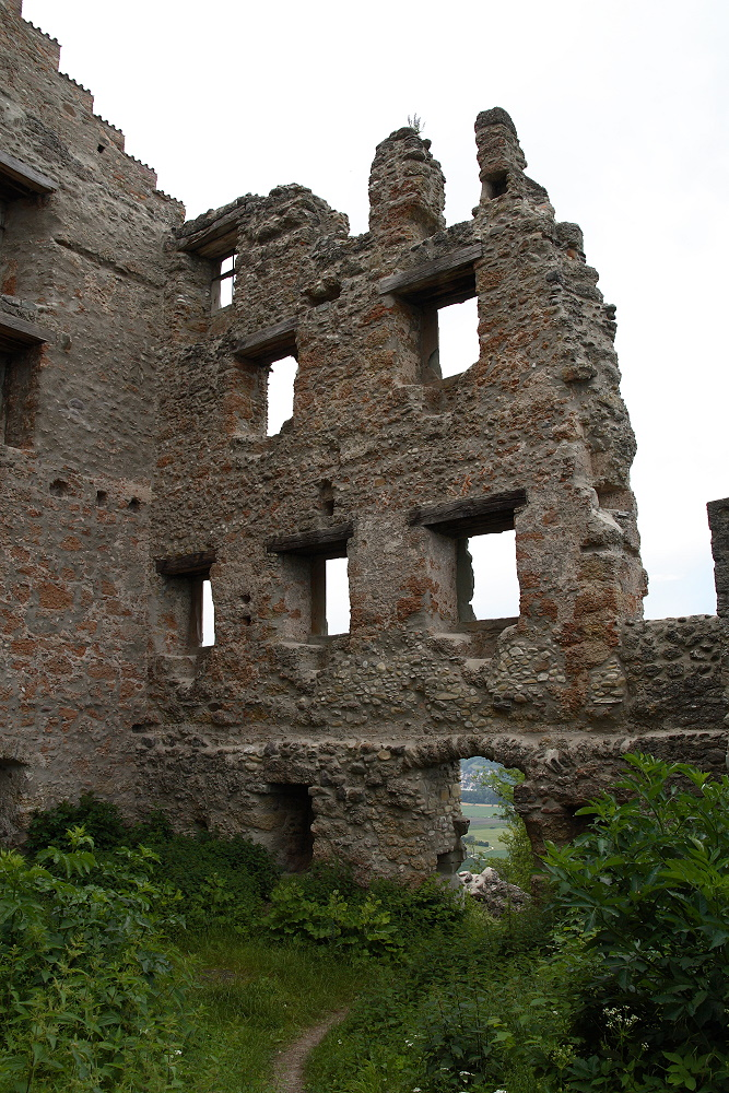 Ruine Bodman, Innen im Palas Nordseite, Blick nach Norden. Rechts davon befindet sich die Aussichtsplattform.